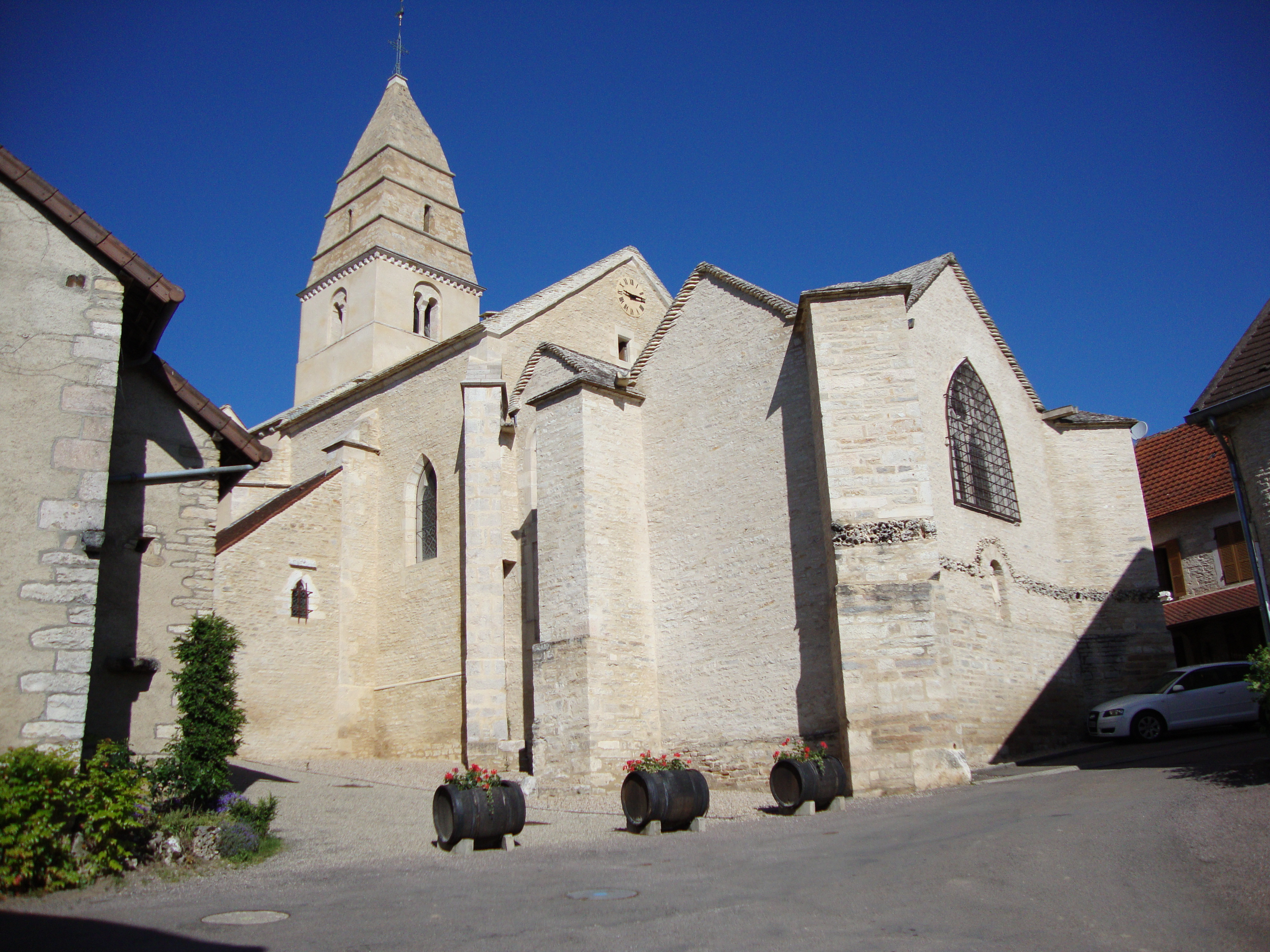 Saint-Aubin (Côte-d'Or, Fr) church.